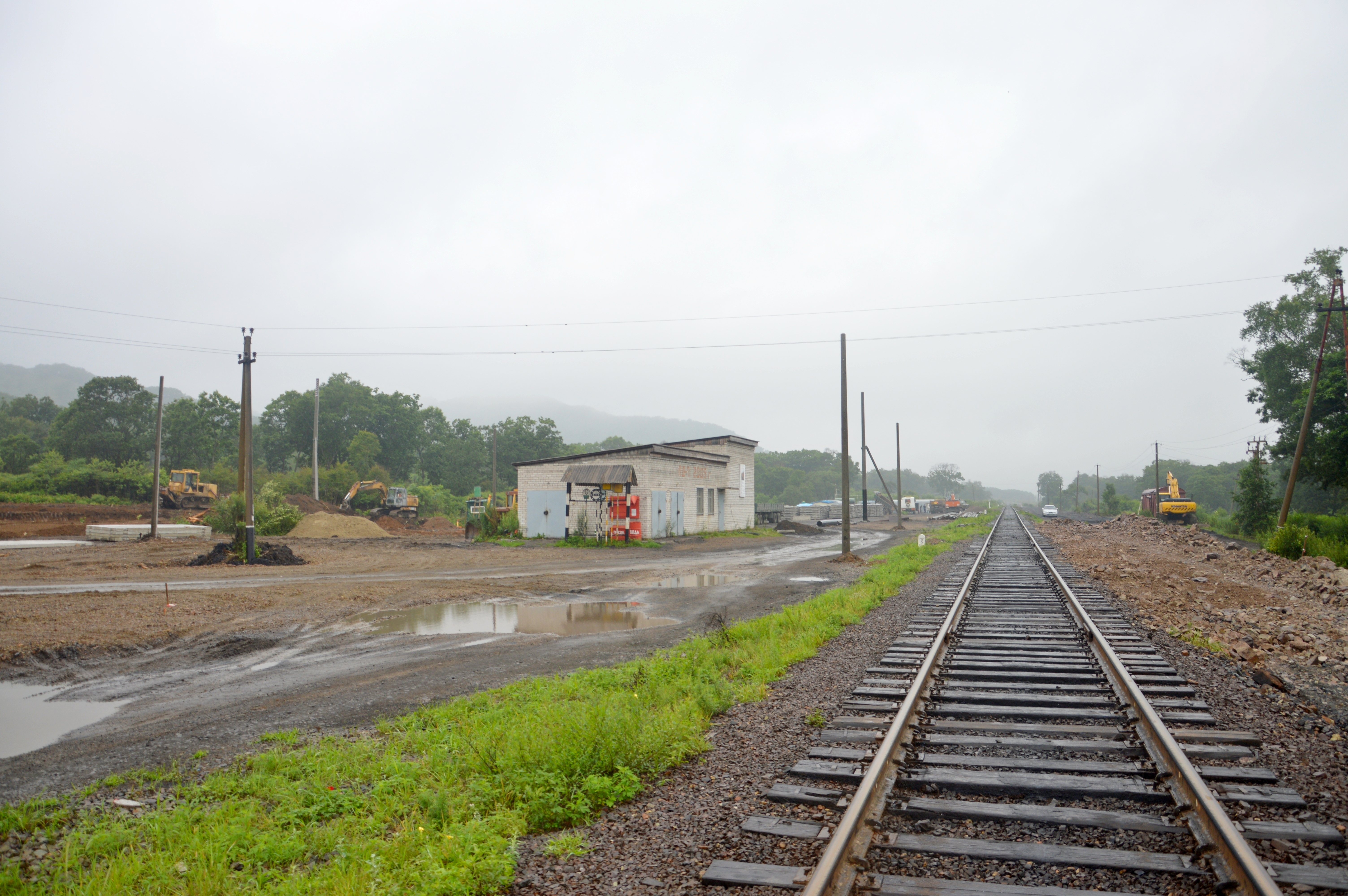 Строительные работы на станции Рязановка Хасанского района Приморского края, 2014